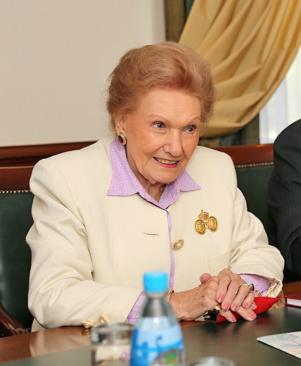 2 октября 2012 глава Владивостока Игорь Пушкарёв встретился с Ольгой Куликовской-Романовой, супругой родного племянника последнего российского императора Николая II, председателем благотворительного фонда. Ее визит связан с подготовкой к празднованию 400-летия дома Романовых. Во встрече также участвовали митрополит Владивостокский и Приморский Вениамин, заместители главы администрации Елена Щеголева и Роман Карманов.